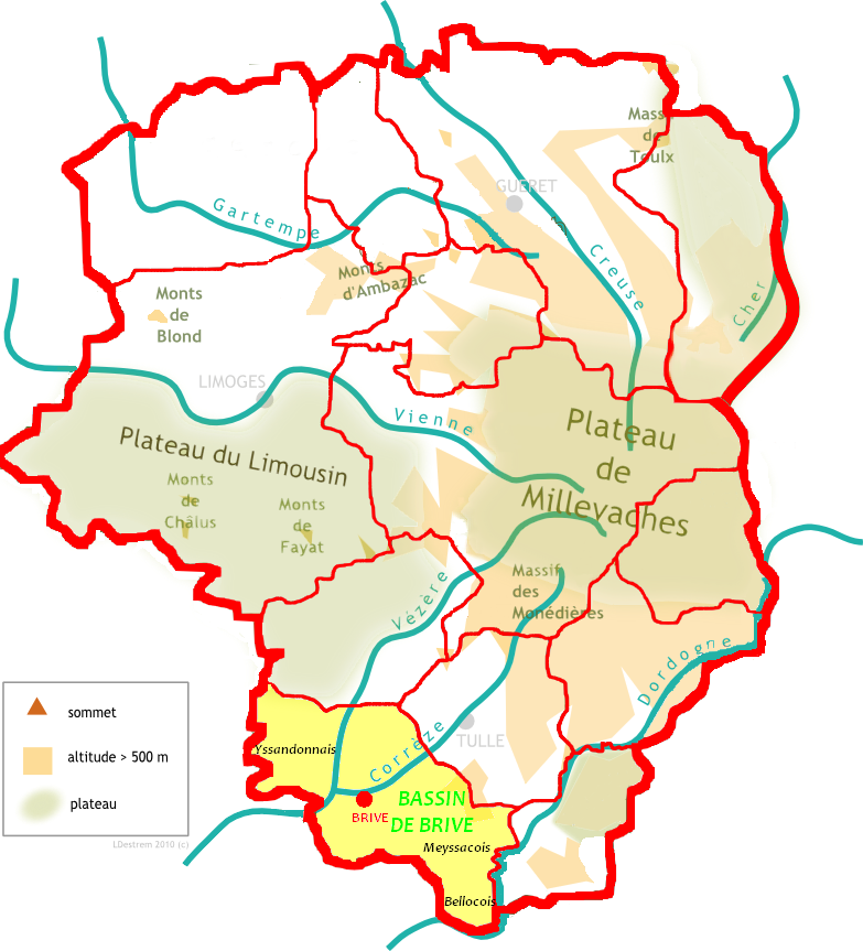 Localisation du Bassin de Brive sur la carte des pays traditionnels du limousin